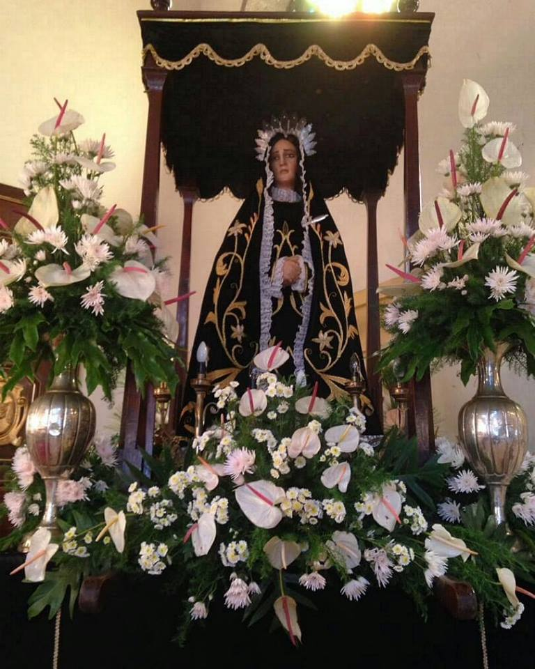 Esta foto fue tomada en la Catedral Santa Rosa de Lima en Carúpano en la procesión de Miércoles Santo 2018